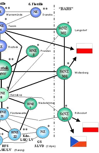 Auszug aus dem Schema des Führungssystems